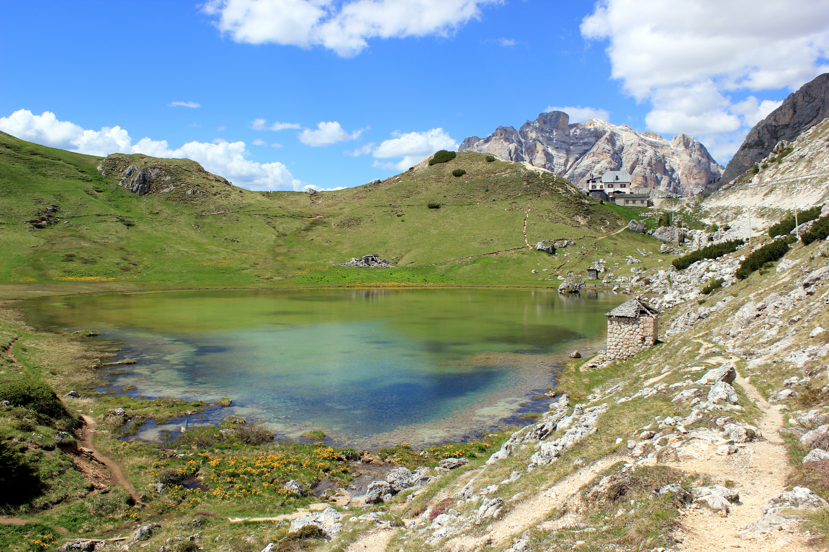 Auf dem Valparolapass, Provinz Belluno.